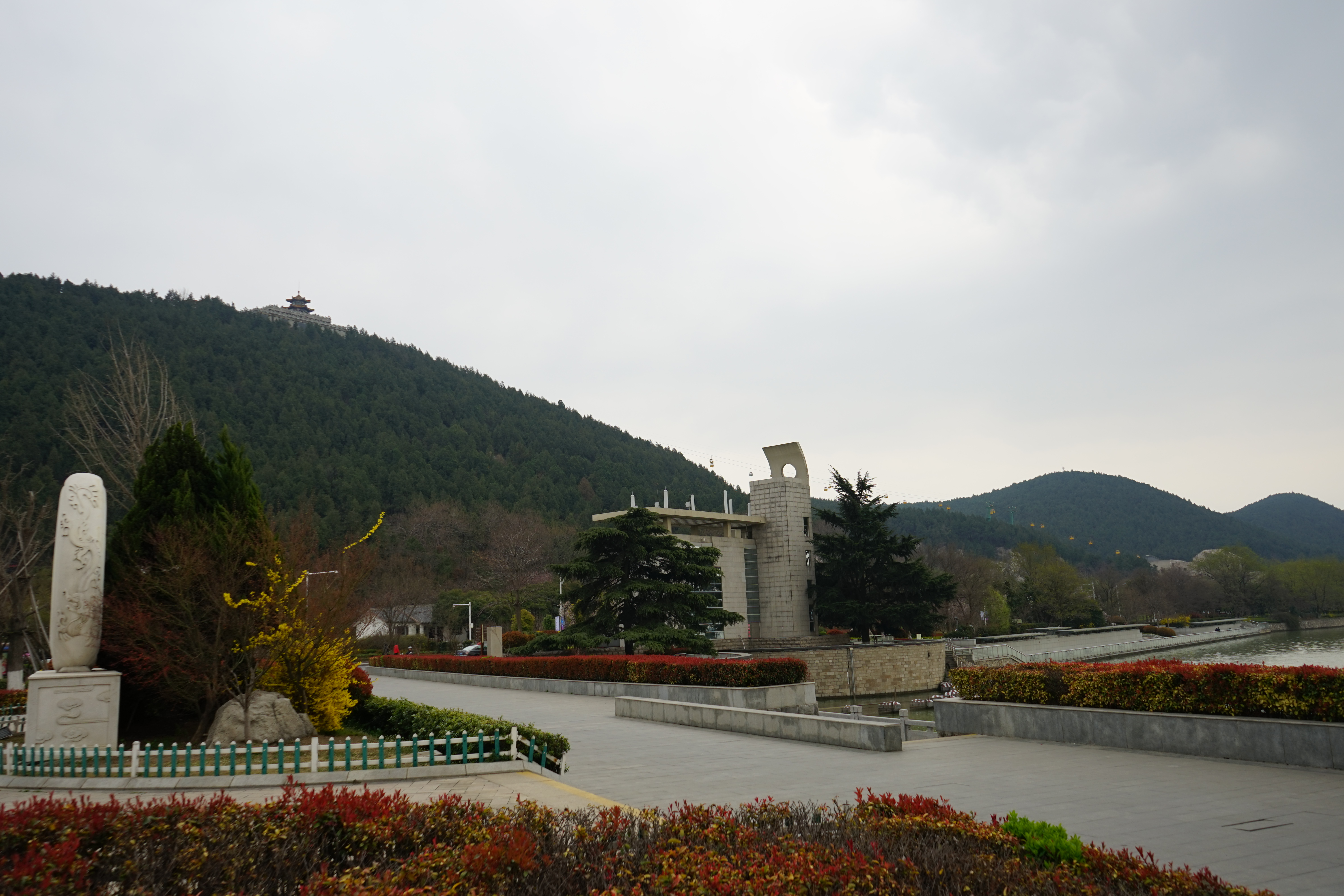 云龙湖畔眺望云龙山